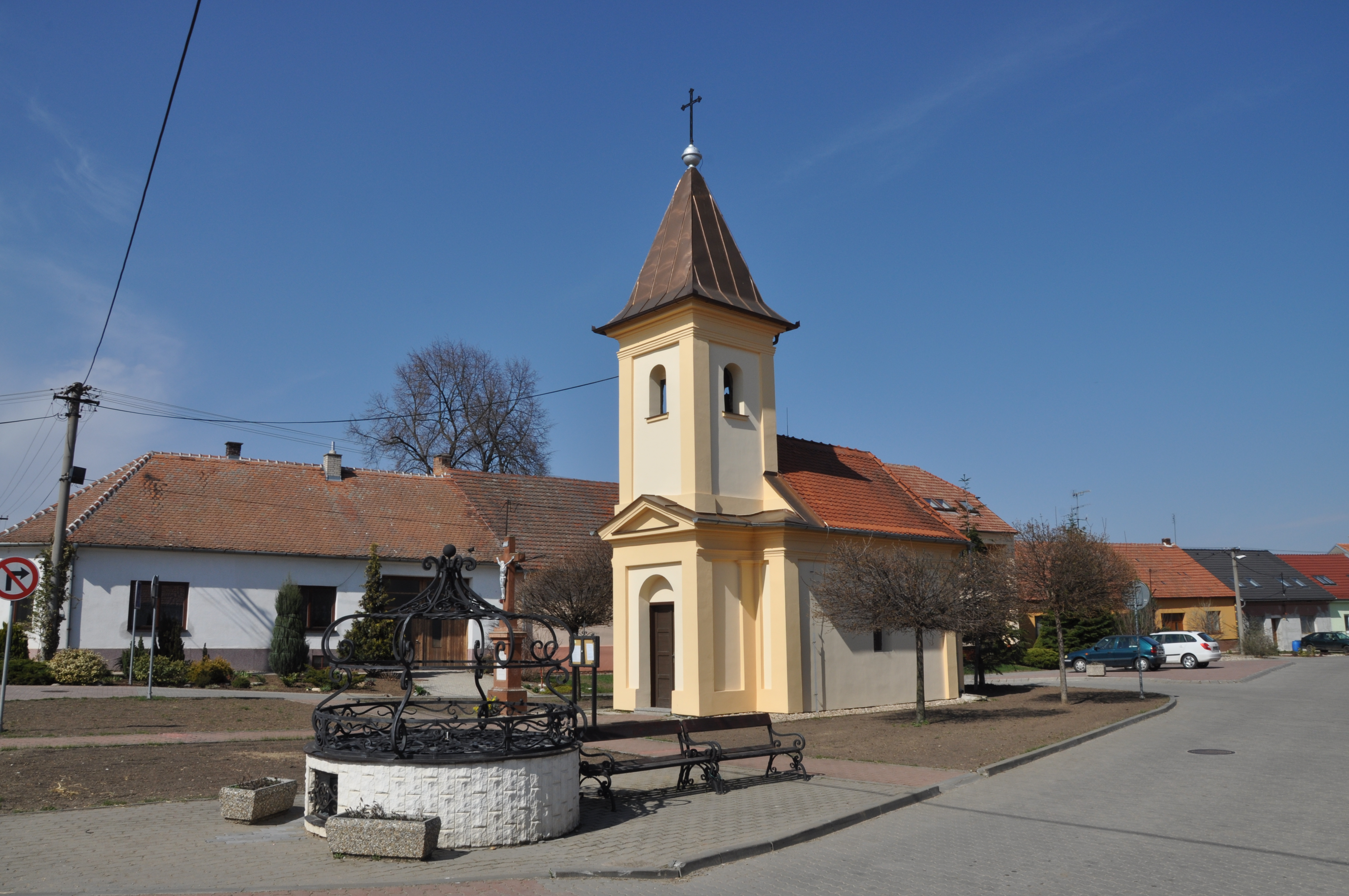 Žabčice, kaple svatého Vavřince.